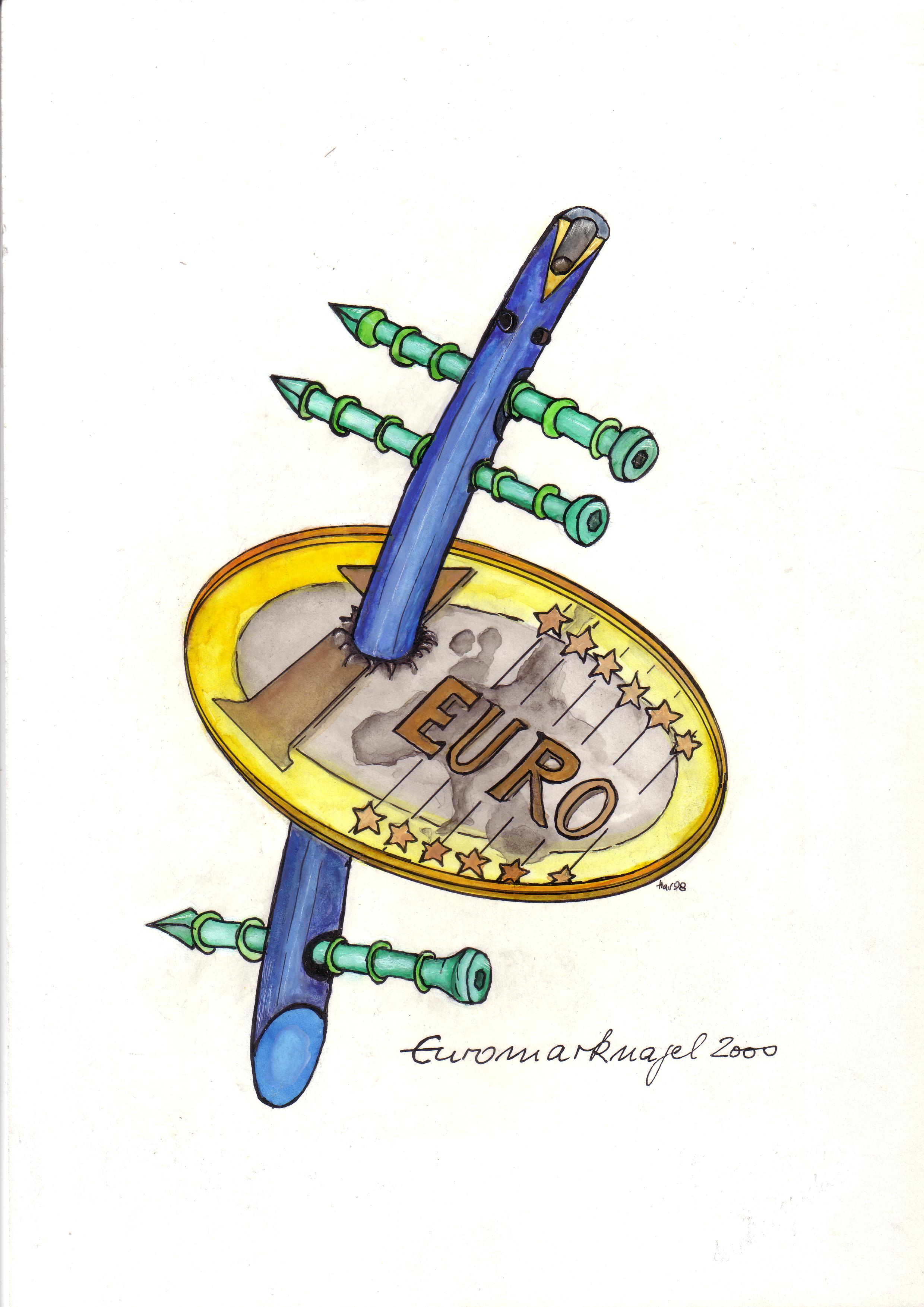 Cartoon und Wortspiel zu Euromünze und Marknagel/Deutsche Mark